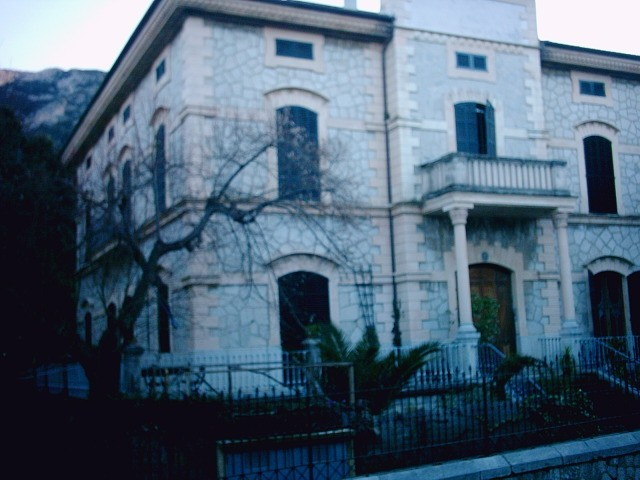 Sòller Fotografia feta per Plàcid Pérez Bru